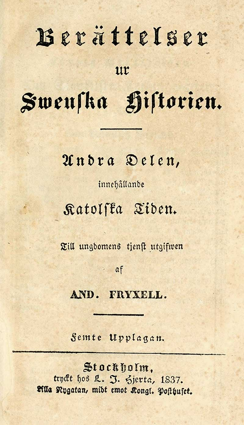 Berättelser ur svenska historien. D. 2,Innehållande Katolska tiden. 5. uppl. Stockholm :Hjerta, 1837